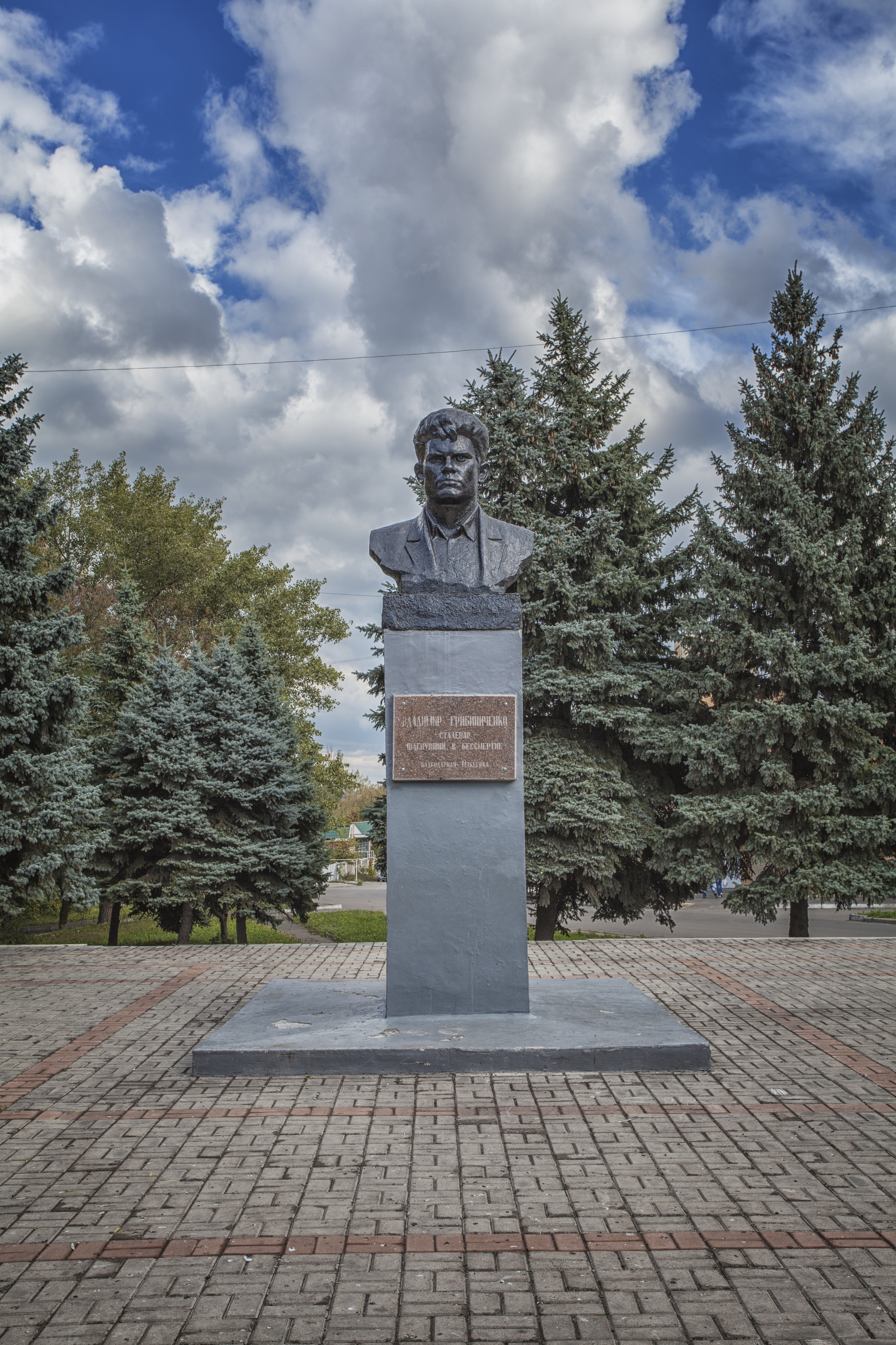 Пам'ятник металургу Грибиниченку В., Макіївка, Центрально-Міський р-н, пр. Леніна.